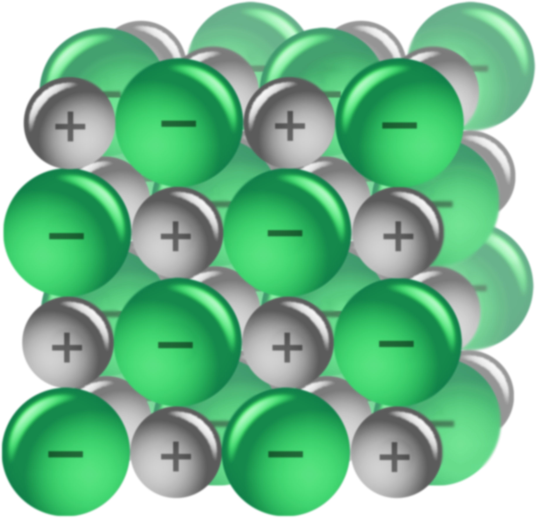 molecule model